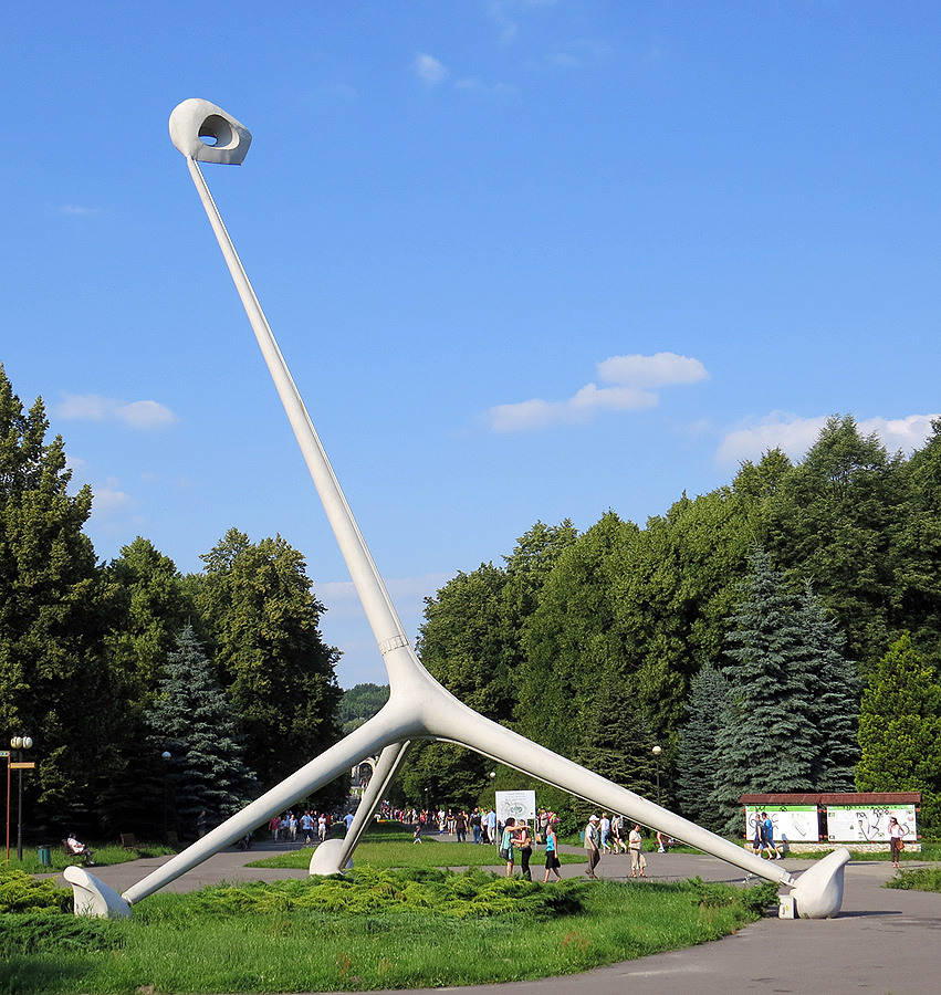 Rzeźba, pomnik "Żyrafa", przy wejściu do Parku Śląskiego w Chorzowie